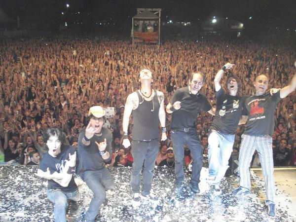 Show Multishow Ao Vivo do Capital Inicial em Mogi das Cruzes dia 12 de Novembro de 2008